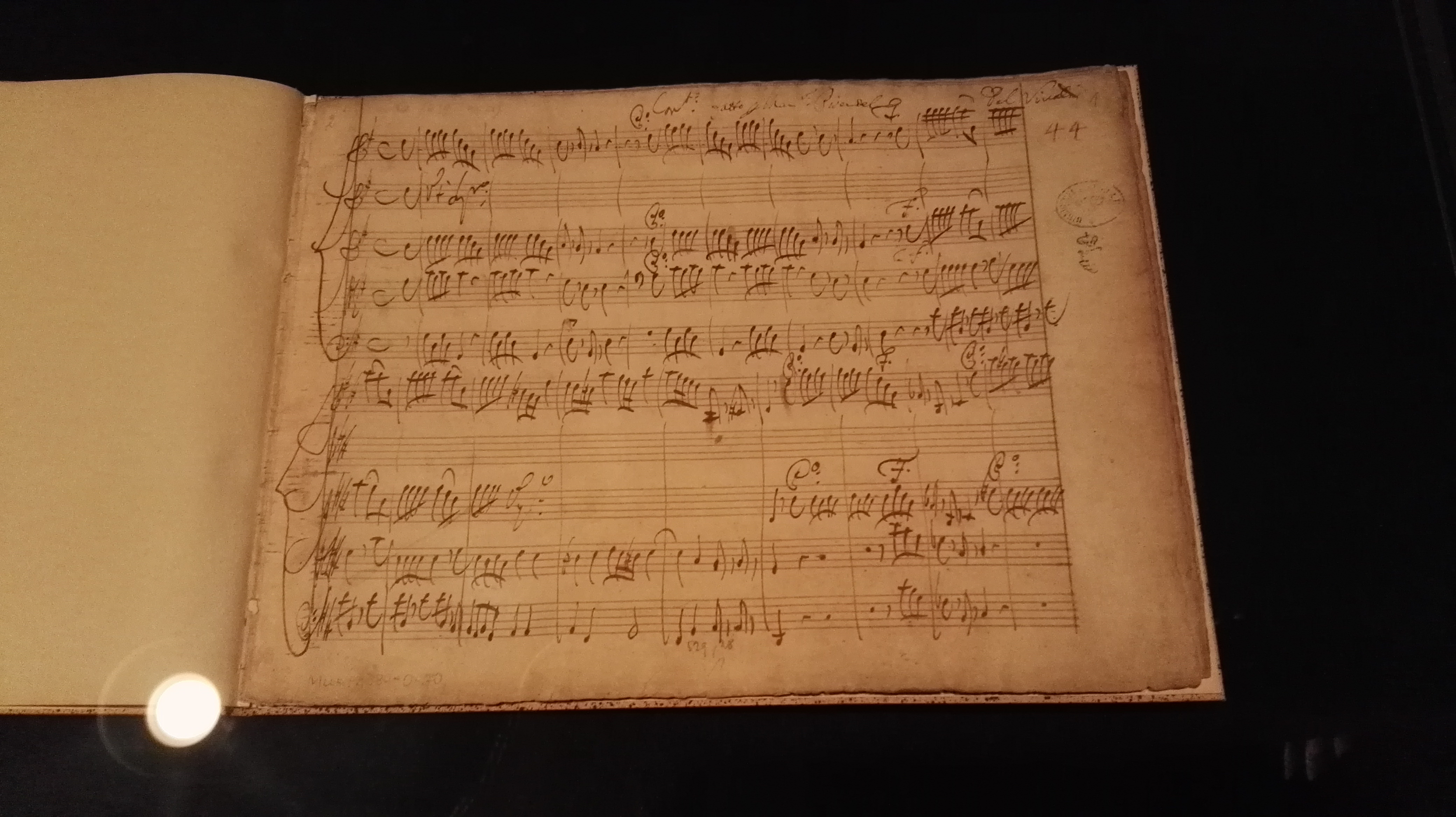 Antonio Vivaldi: Violinkonzert G-Dur R314; vom Autor geschriebene und Johann Georg Pisendel gewidmete Partitur im Buchmuseum in Dresden